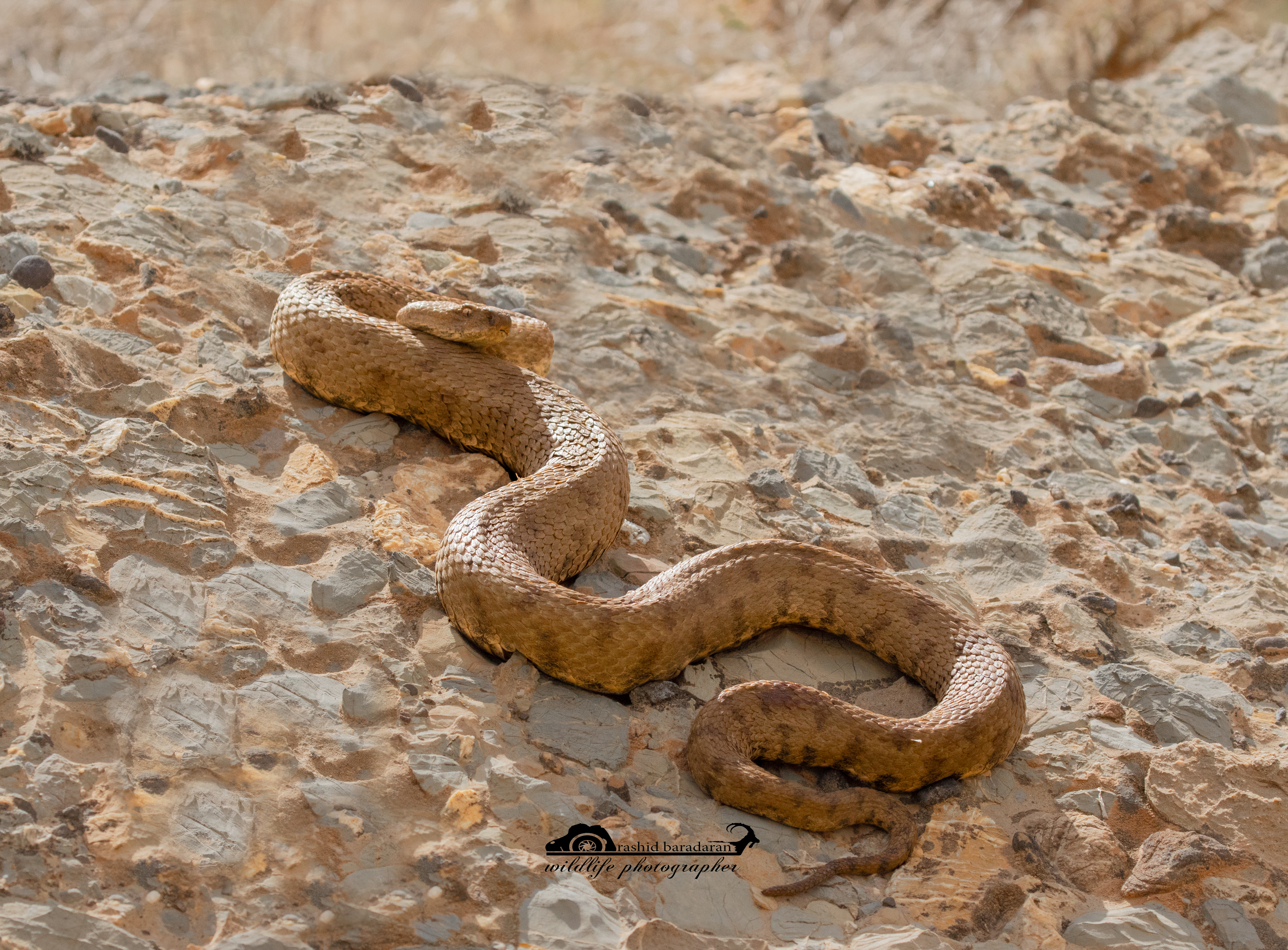 گرزه مار که از سمی‌ترین گونه مارهای ایران محسوب می‌شود از خانواده افعی هاست و در بیشتر مناطق ایران دیده می‌شود.